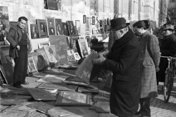 Italia Dopoguerra. Milano - fiera degli Obèi - Obèi: coppia di avventori presso un venditore di quadri.